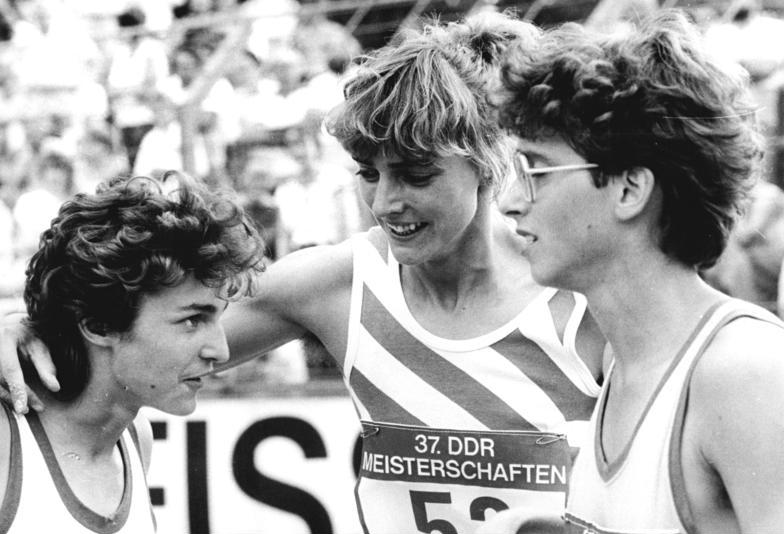 Heike Drechsler, Heike Morgenstern, Silke Gladisch ADN-ZB Hirndorf 29.6.86 Bez. Gera: DDR-Leichtathletik-Meisterschaften in Jena- Heike Drechsler (MItte) vom SC Motor Jena nimmt glücklich die Glückwünsche ihrer Sportkameradinnen Heike Morgenstern (r.) vom ASK Potsdam und Silke Gladisch vom SC Empor Rostock entgegen. Heike Drechsler egalisierte den 200-m-Weltrekord von Marita Koch in 21,71 s. Silke Gladisch wurde Zweite, Heike Morgenstern Vierte.